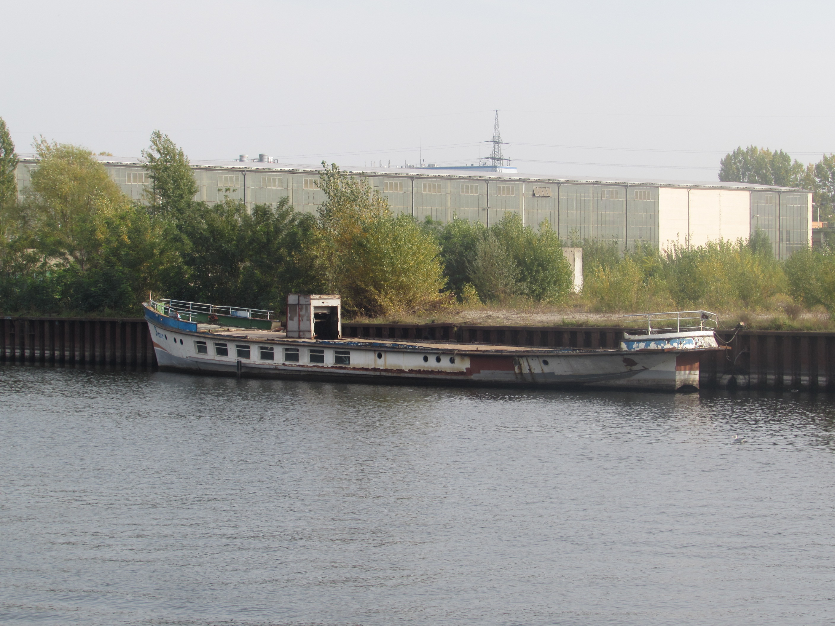 Schiff Amor am Silokanal festgemacht